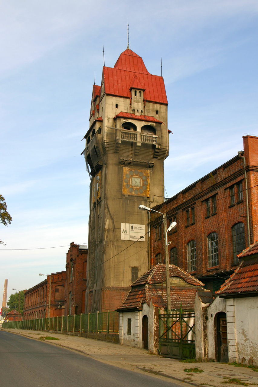 wieża ciśnień w Krapkowicach.